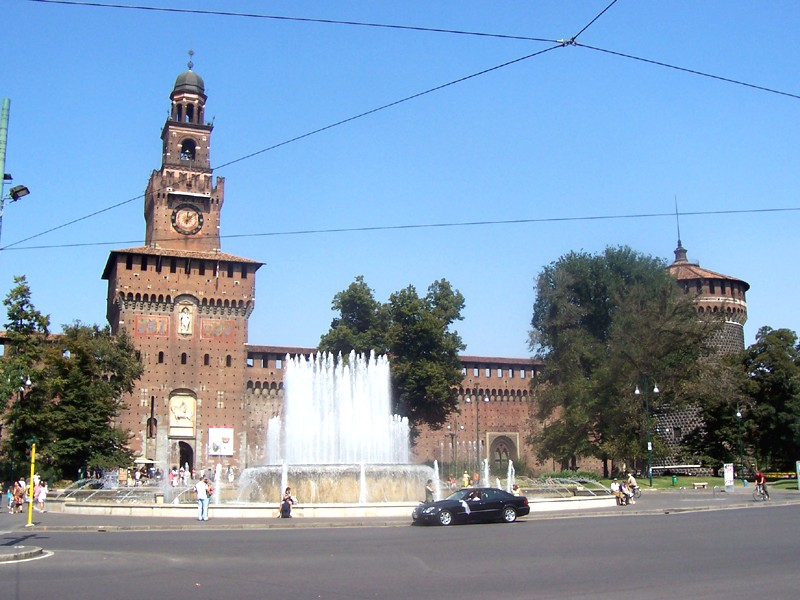 La Torre del Filarete del Castello Sforzesco a Milano.